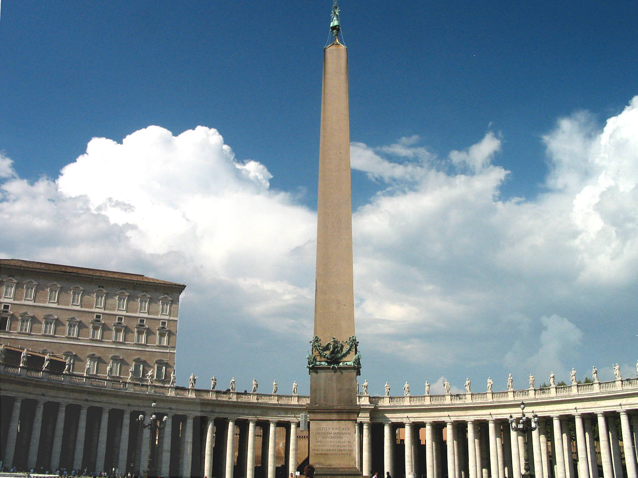 Vatican Piazza San Pietro Obelisk